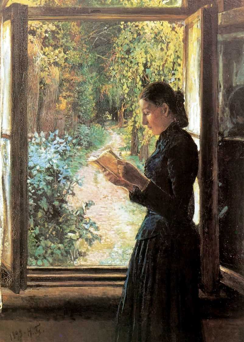 Ге Николай. Портрет Натальи Ивановны Петрункевич. 1892